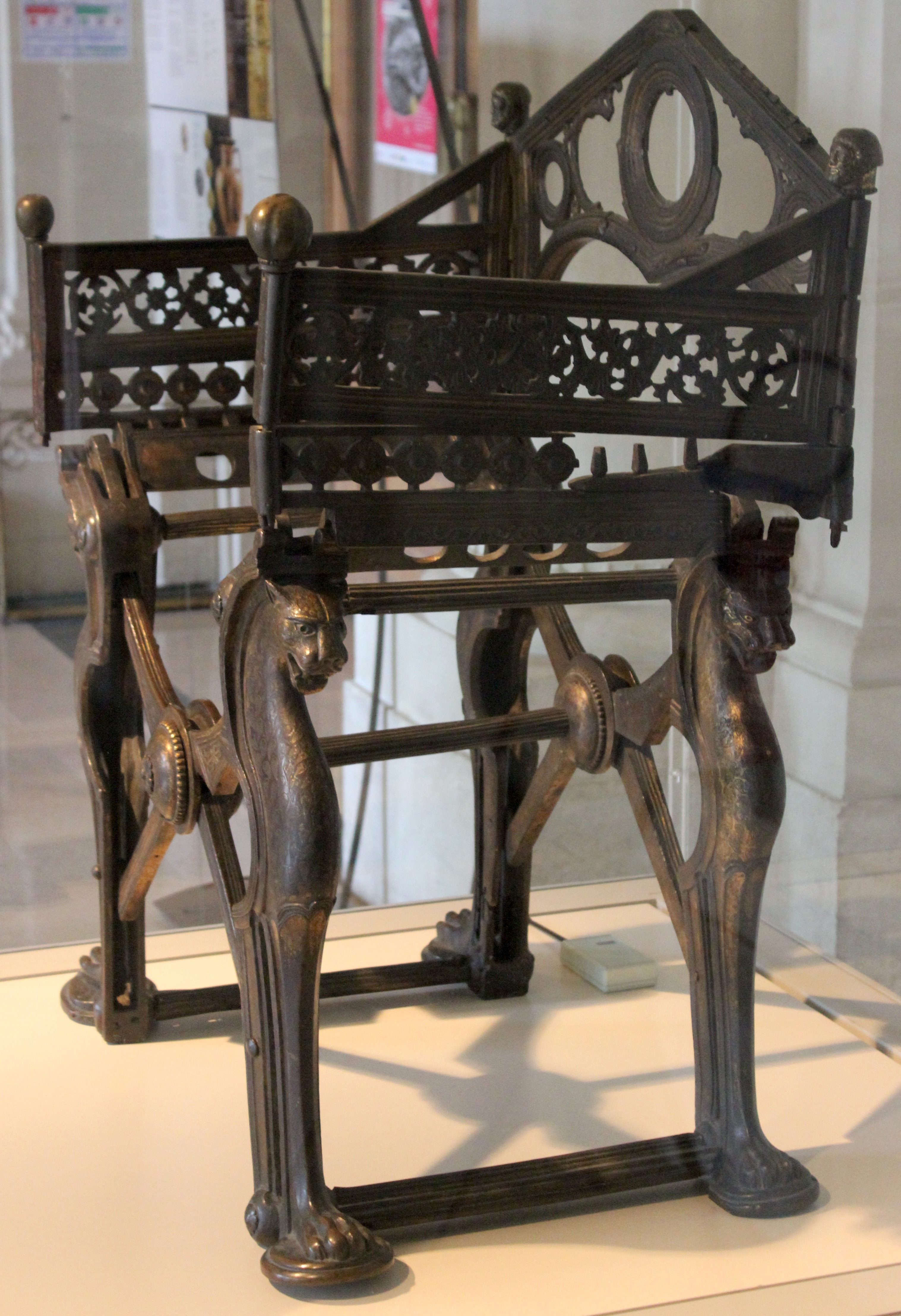 París, Biblioteca Nacional. Trono de Dagoberto.